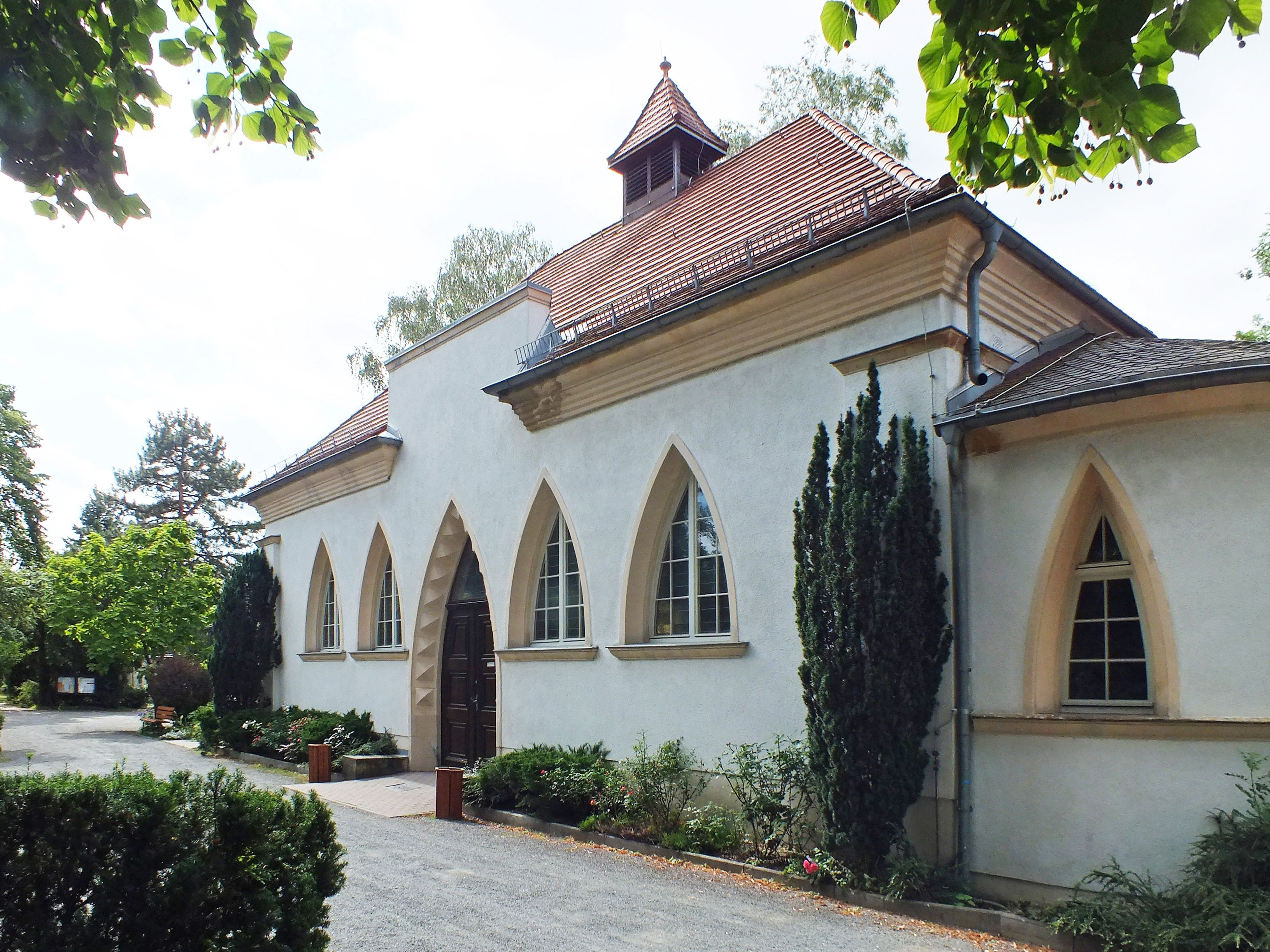 Friedhof Connewitz, Trauerhalle